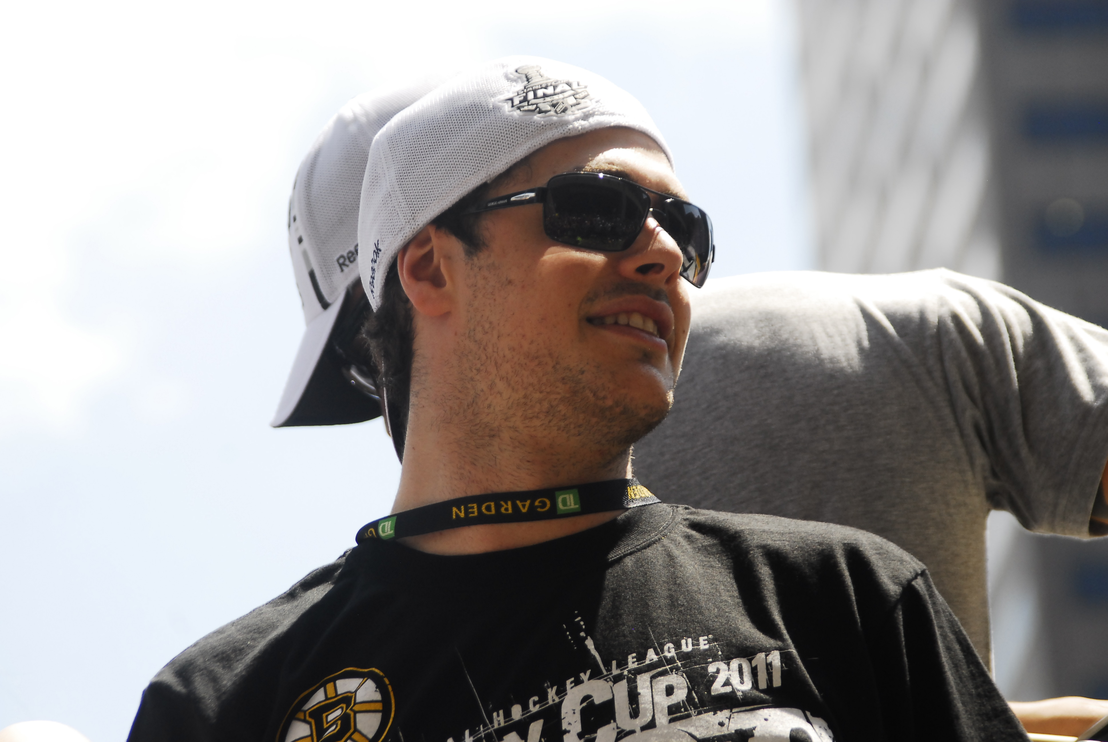 _ERI6452